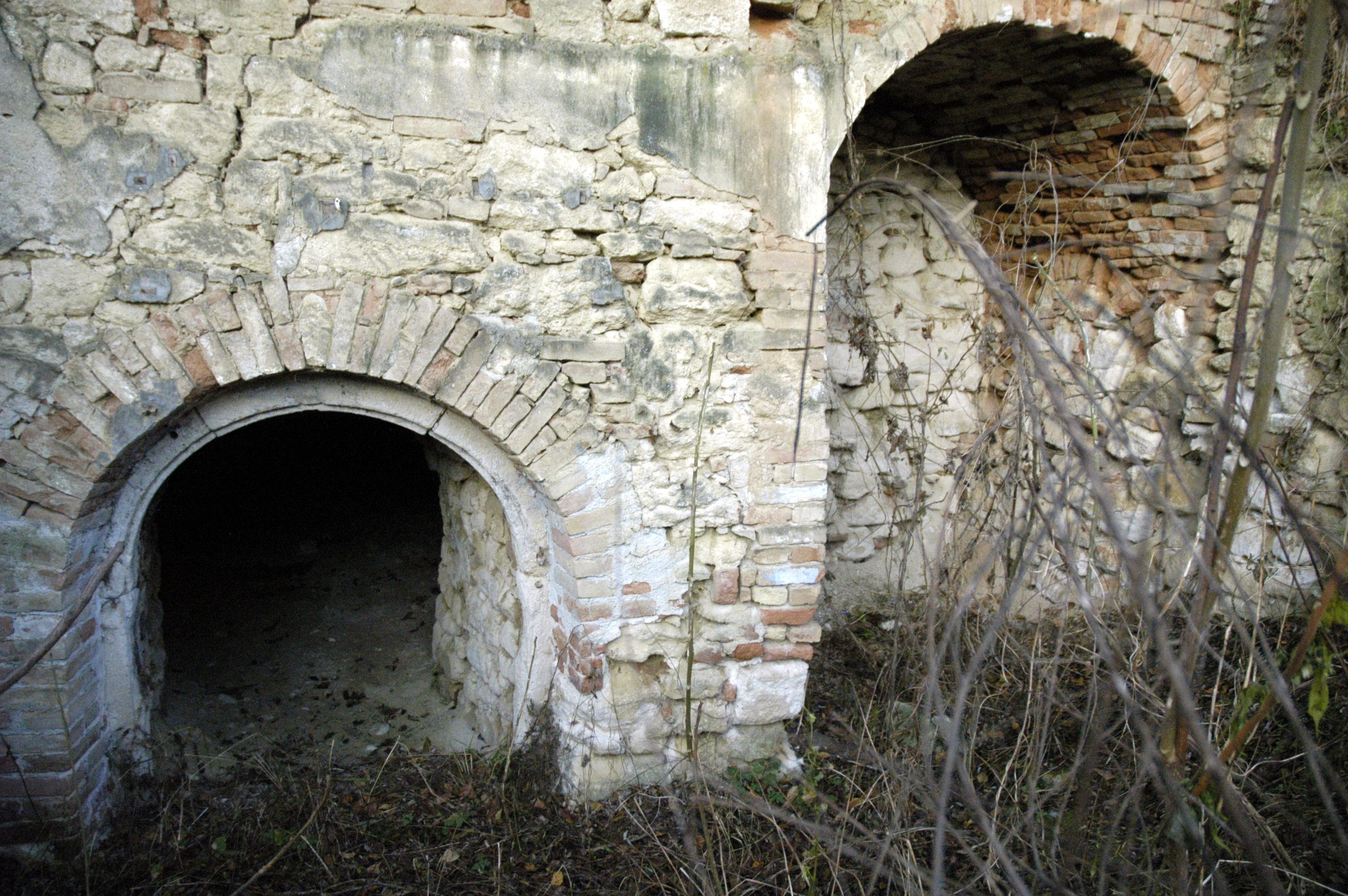 Sitzendorf an der Schmida Mühlbergkellergasse Objekt 20 rechts